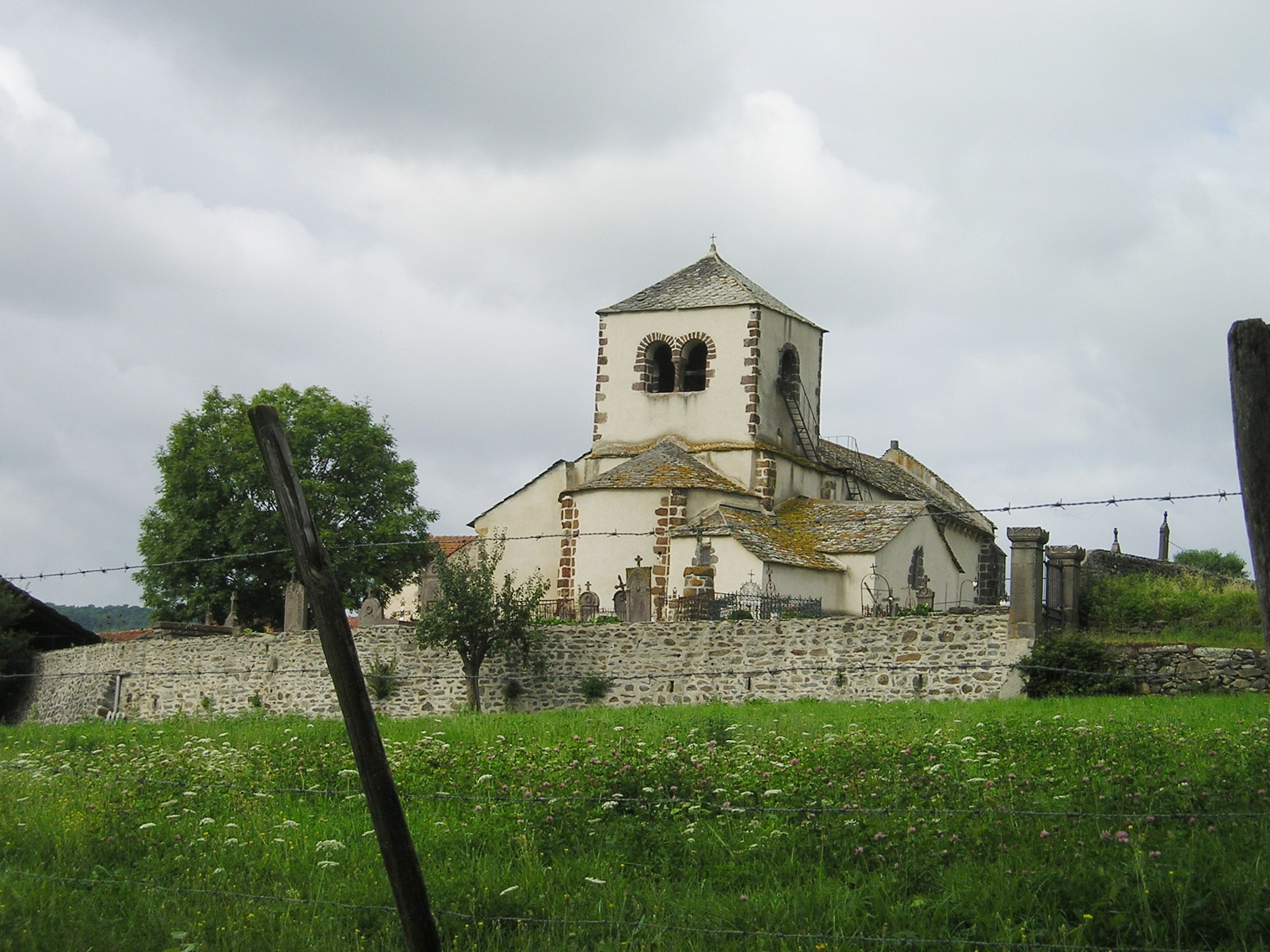 Eglise Saint-Mary in Colamine-sous-Vodable (Puy-de-Dôme)